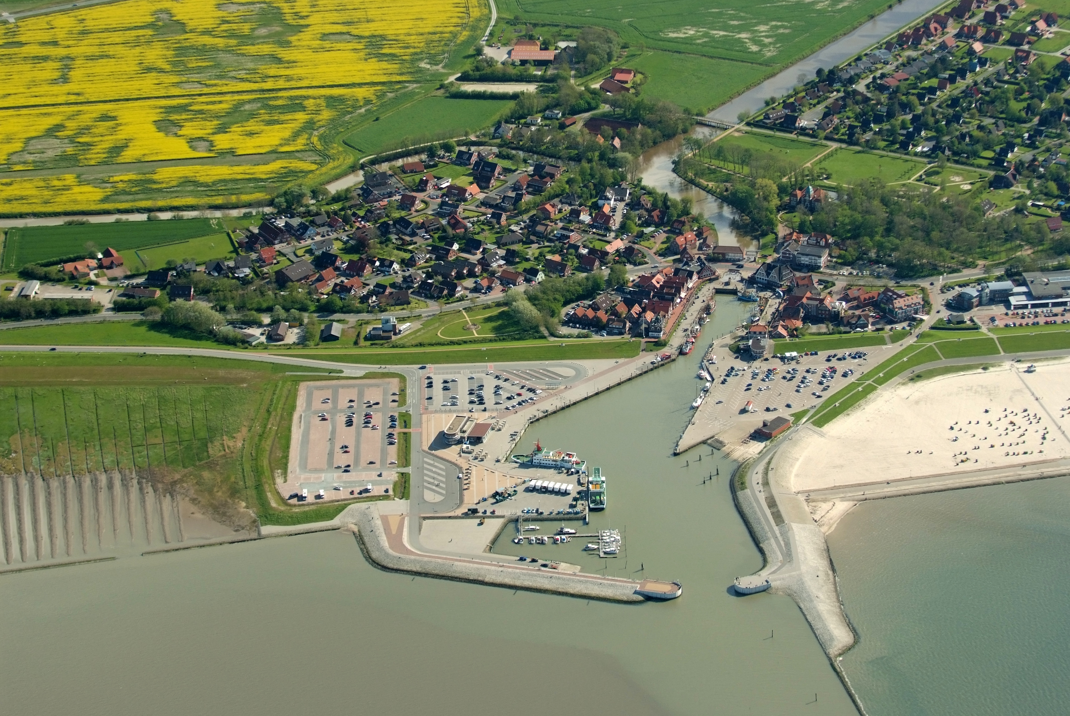 Fotoflug vom Flugplatz Nordholz-Spieka über Bremerhaven, Wilhelmshaven und die Ostfriesischen Inseln bis Borkum